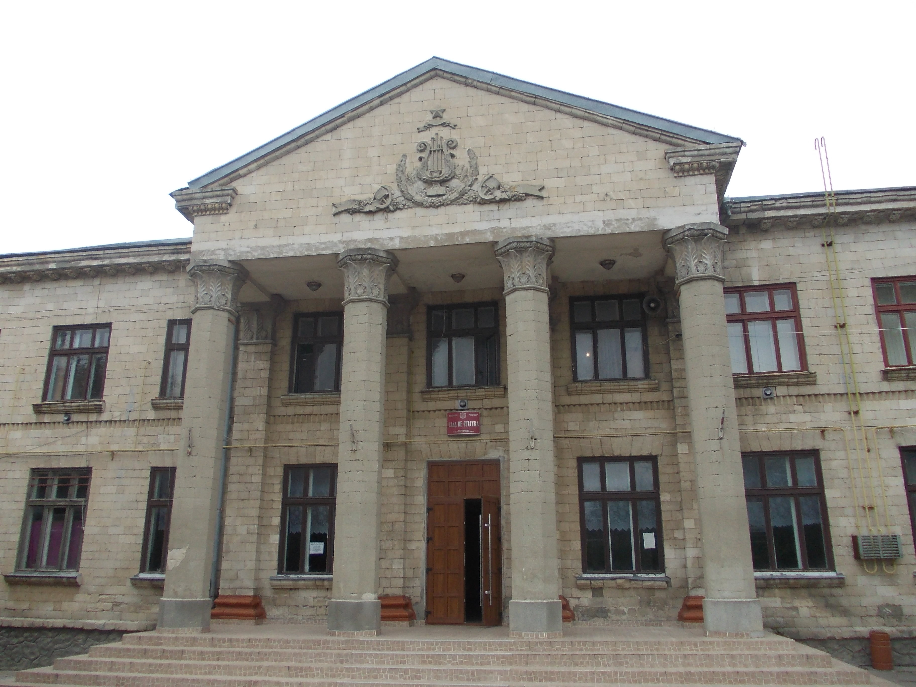 casa de cultură Rîşcani